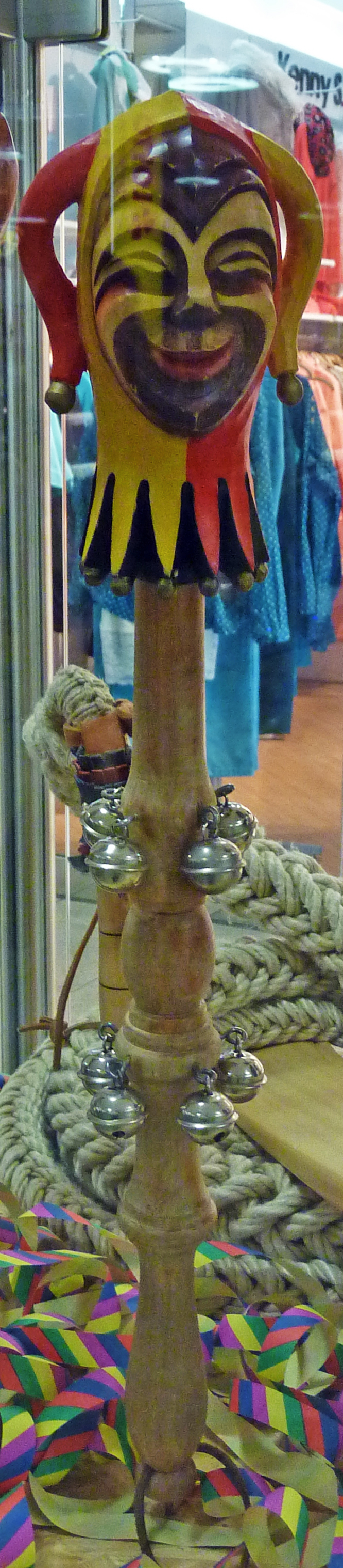 Marotte (Narrenszepter) - Häsrequisit oder Narrenutensil der Zähringer Burgnarren Freiburg i. Br. e.V. Exponat aus der Sammlung Peter Scharte aus der Ortenau, vom 14. Januar bis 13. Februar 2013 im Einkaufszentrum Schwarzwald City (Freiburg) unter dem Titel „Narrenrequisiten - vielfältig und kreativ“ ausgestellt.